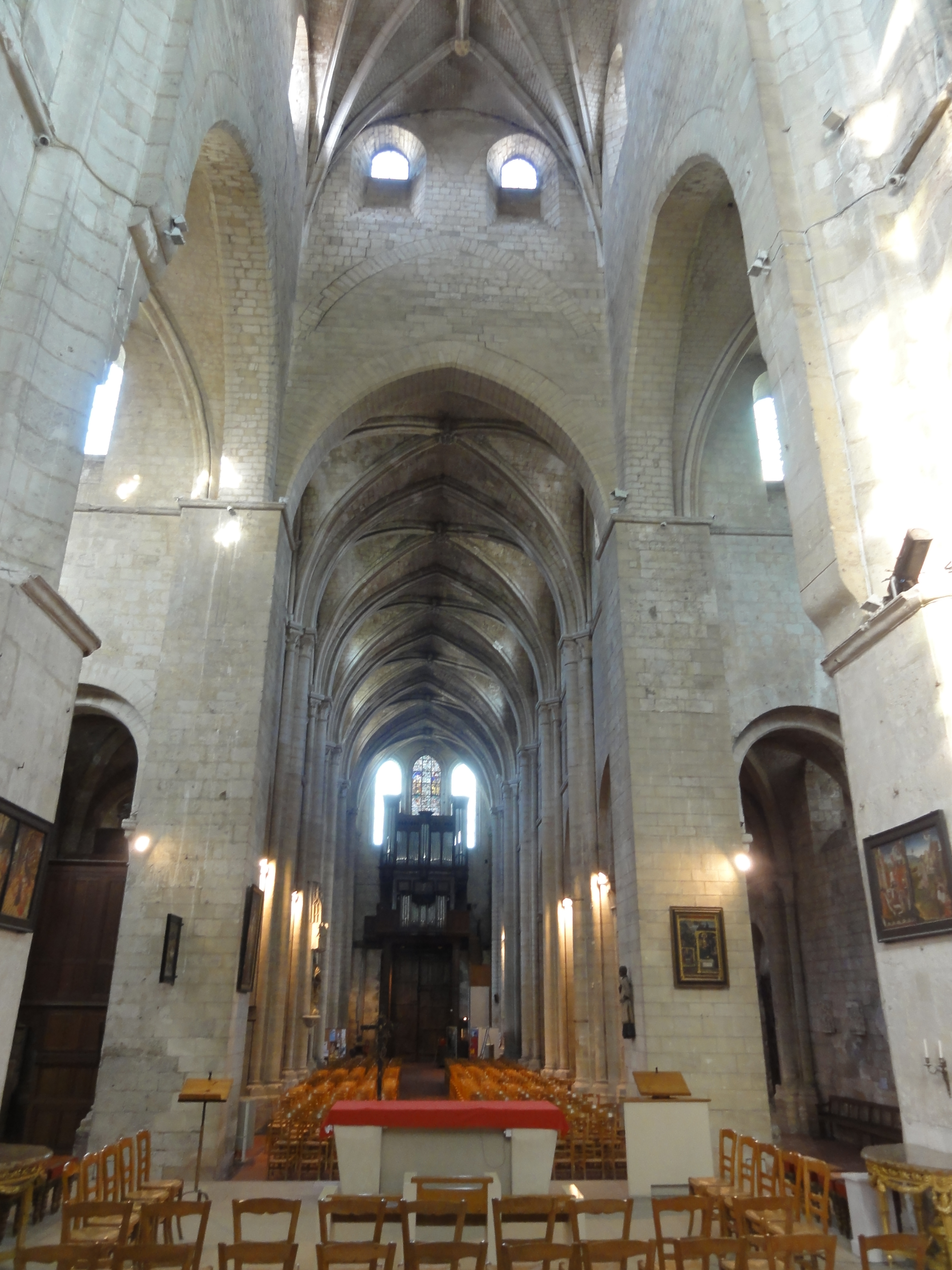 Croisée, vue vers l'ouest.